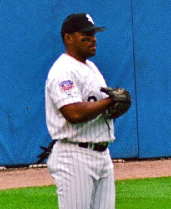 00337_n_12ag9rg4vb0350